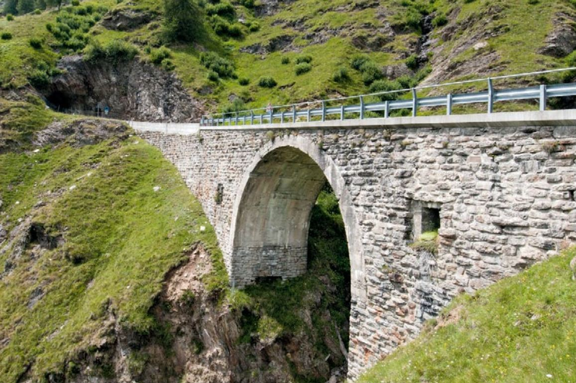 Ponte militare presso la strada militare che porta al passo Rombo